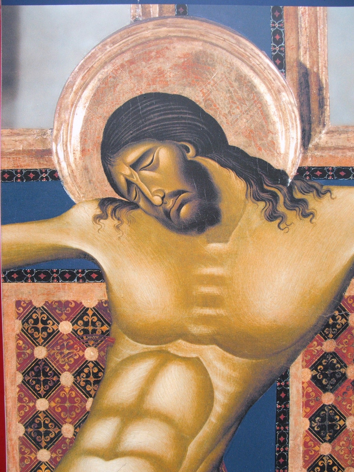 Il crocefisso di Cimabue, restaurato, nella chiesa di San Domenico ad Arezzo.